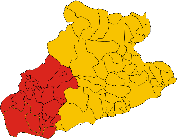 Mappa della Comunità Montana Intemelia (Provincia di Imperia, Liguria, Italia) con i comuni originari dal 1973 al 2008